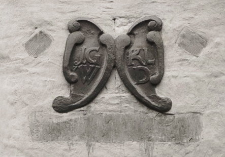 Minnessten på Borgmästare Westermans hus från 1640-talet. JGW och KLD står för Johan Gerhardi Westerman (adlad Liljencrantz, 1604-1653) och hans hustru Karin Larsdotter. Kvarteret Cybele.